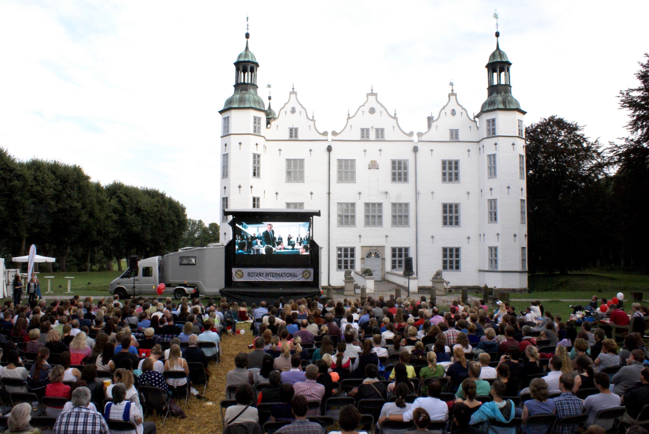 Kinosommer mit Open Air Kino vor dem Ahrensburger Schloss